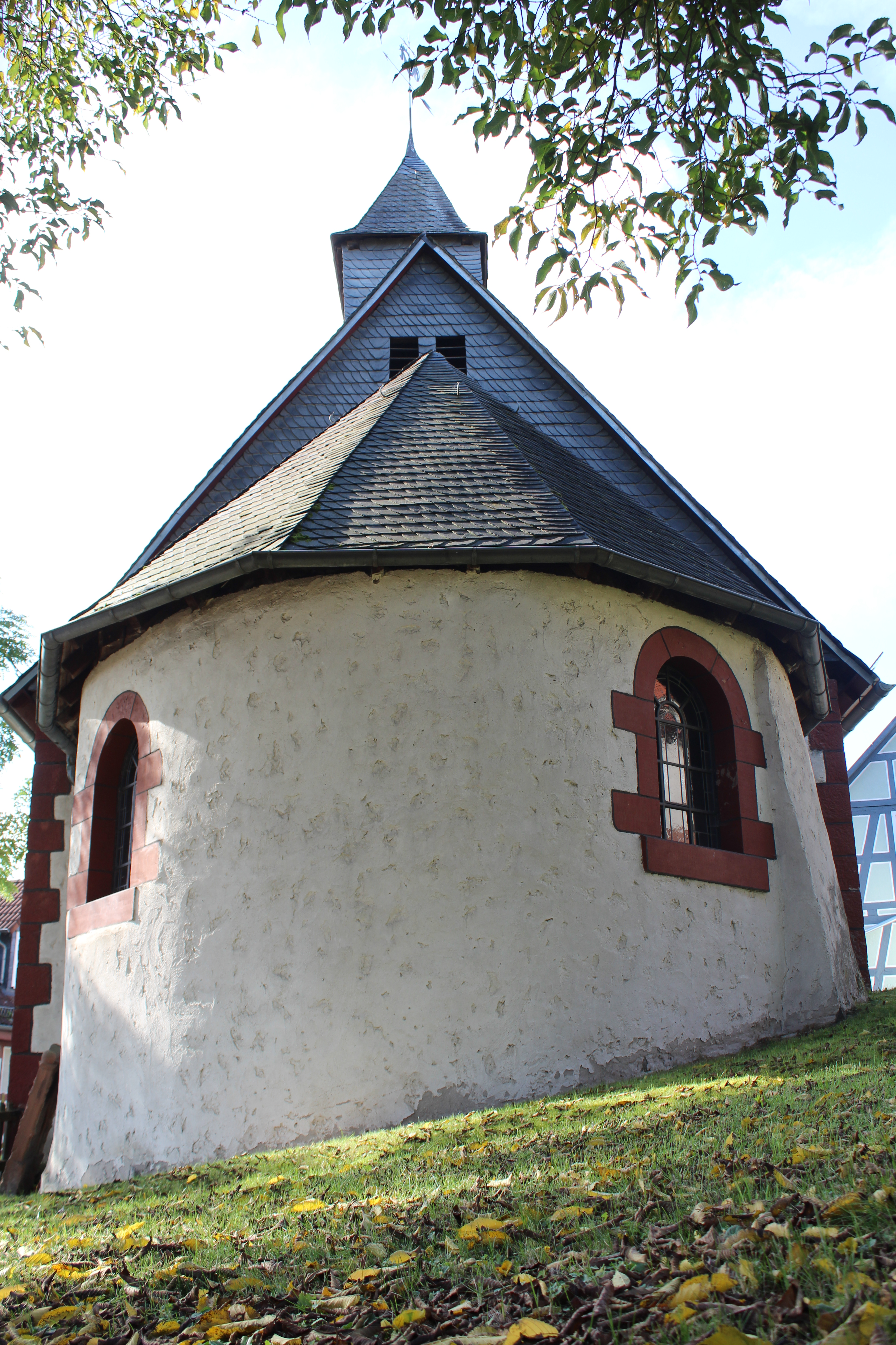 Hufeisenkirche Altenvers, Gemeinde Lohra, Landkreis Marburg-Biedenkopf, Hessen, Deutschland